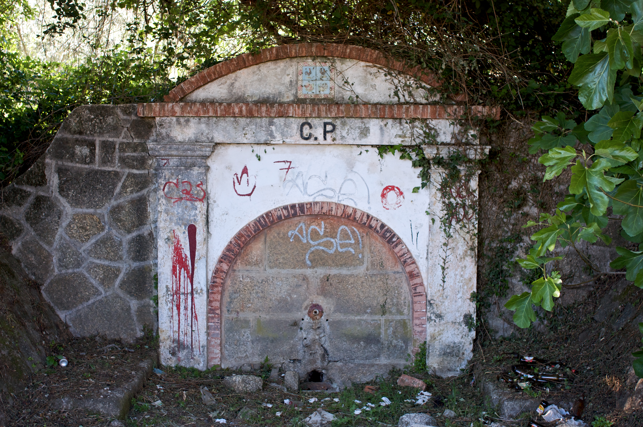 pormenor da antiga fonte. Tipo: A [ Apeadeiro ] Local: Alpedrinha [Linha da Beira Baixa , PK 128] Data e hora: 11 de Abril de 2009 [17h51]